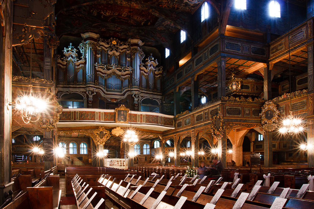 Ewangelicki Kościół Pokoju w Świdnicy. Wnętrze, widok na organy.